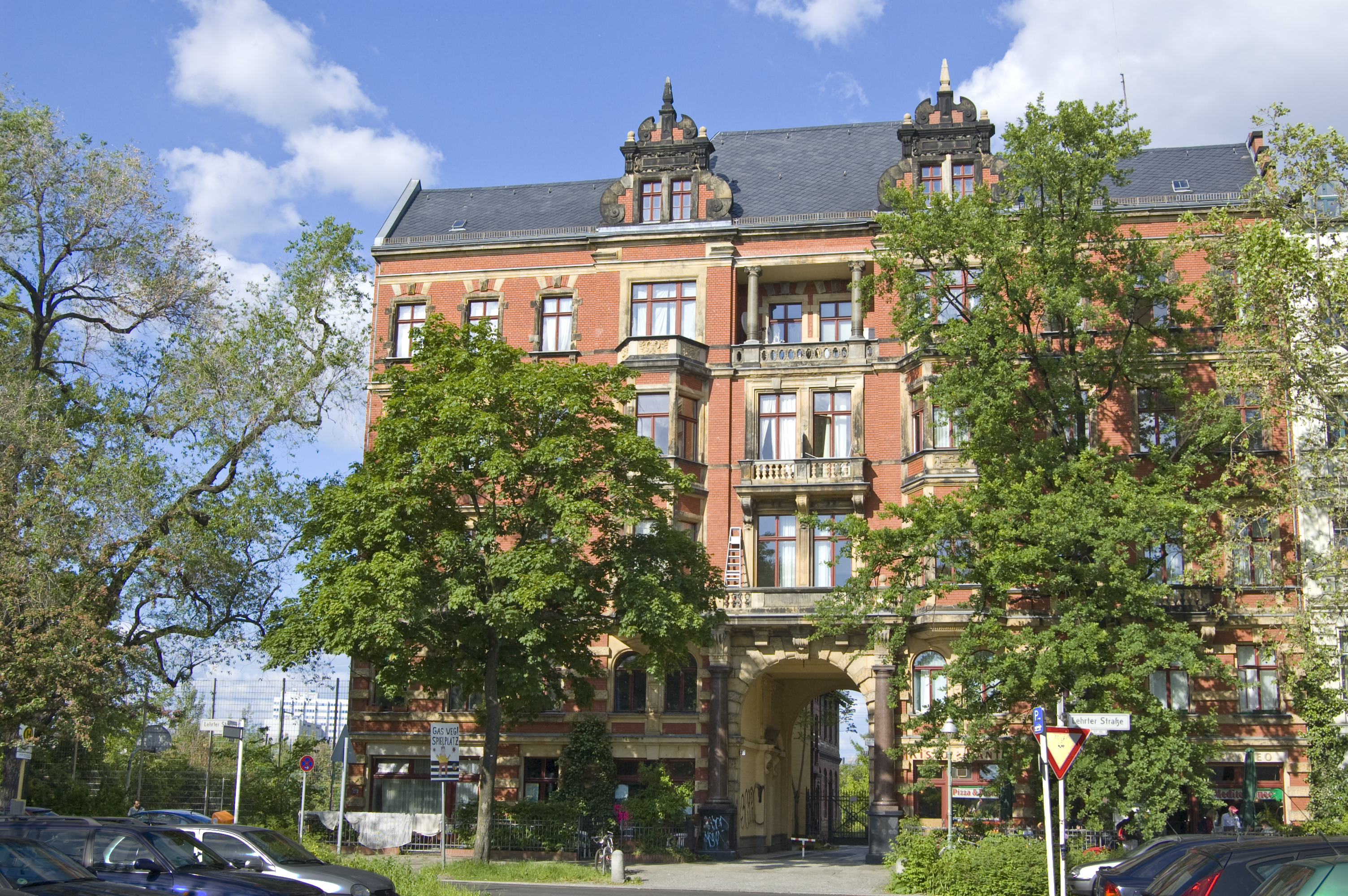 Gründerzeithaus in der Lehrter Straße in Berlin